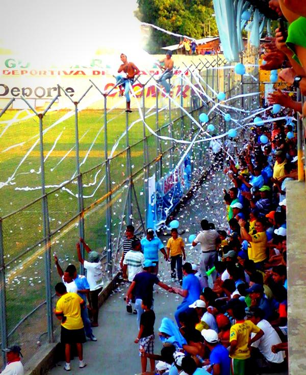 GrecosManabas